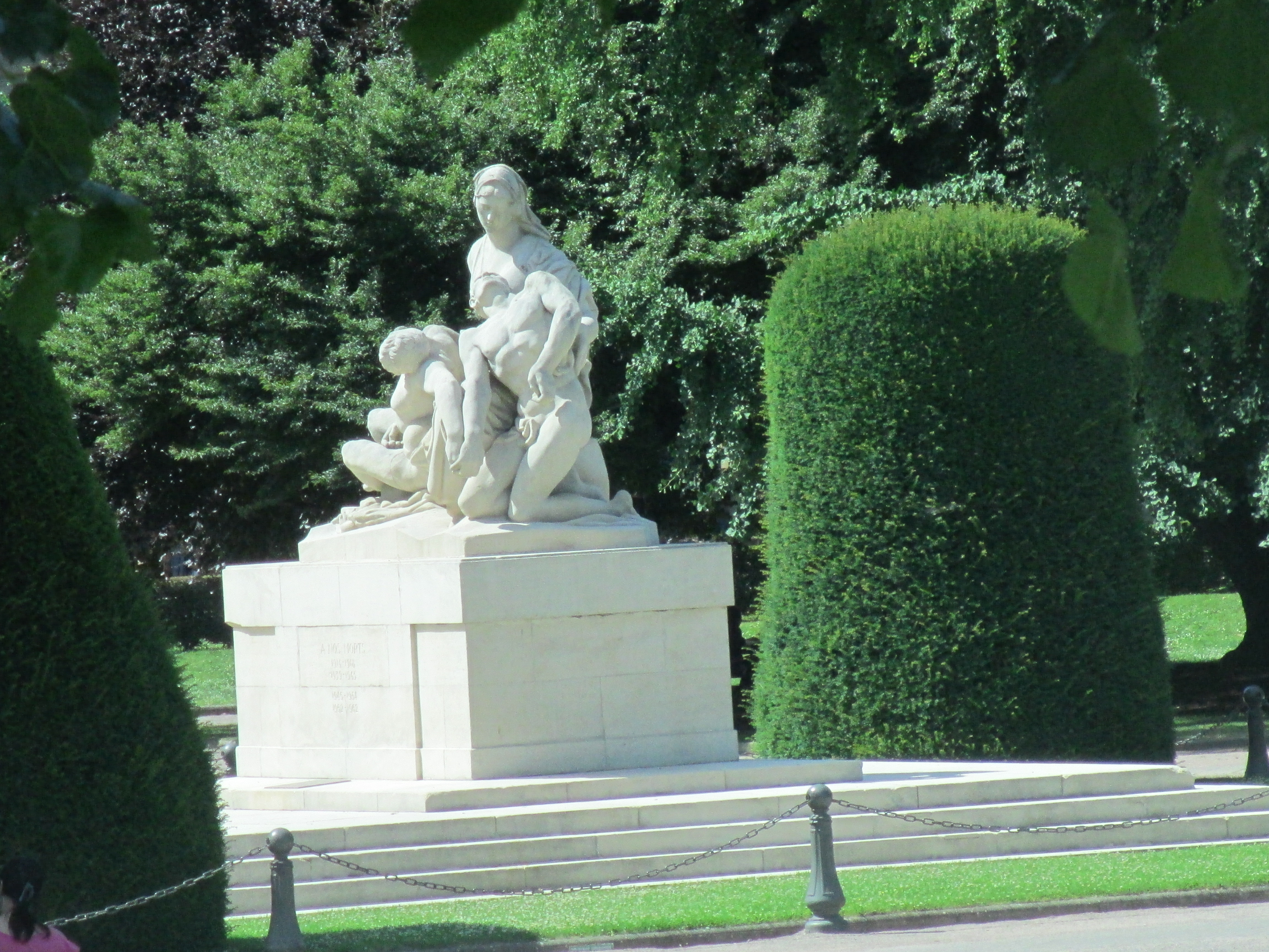 אנדרטת זיכרון לנופלים בכיכר הרפובליקה בשטרסבורג